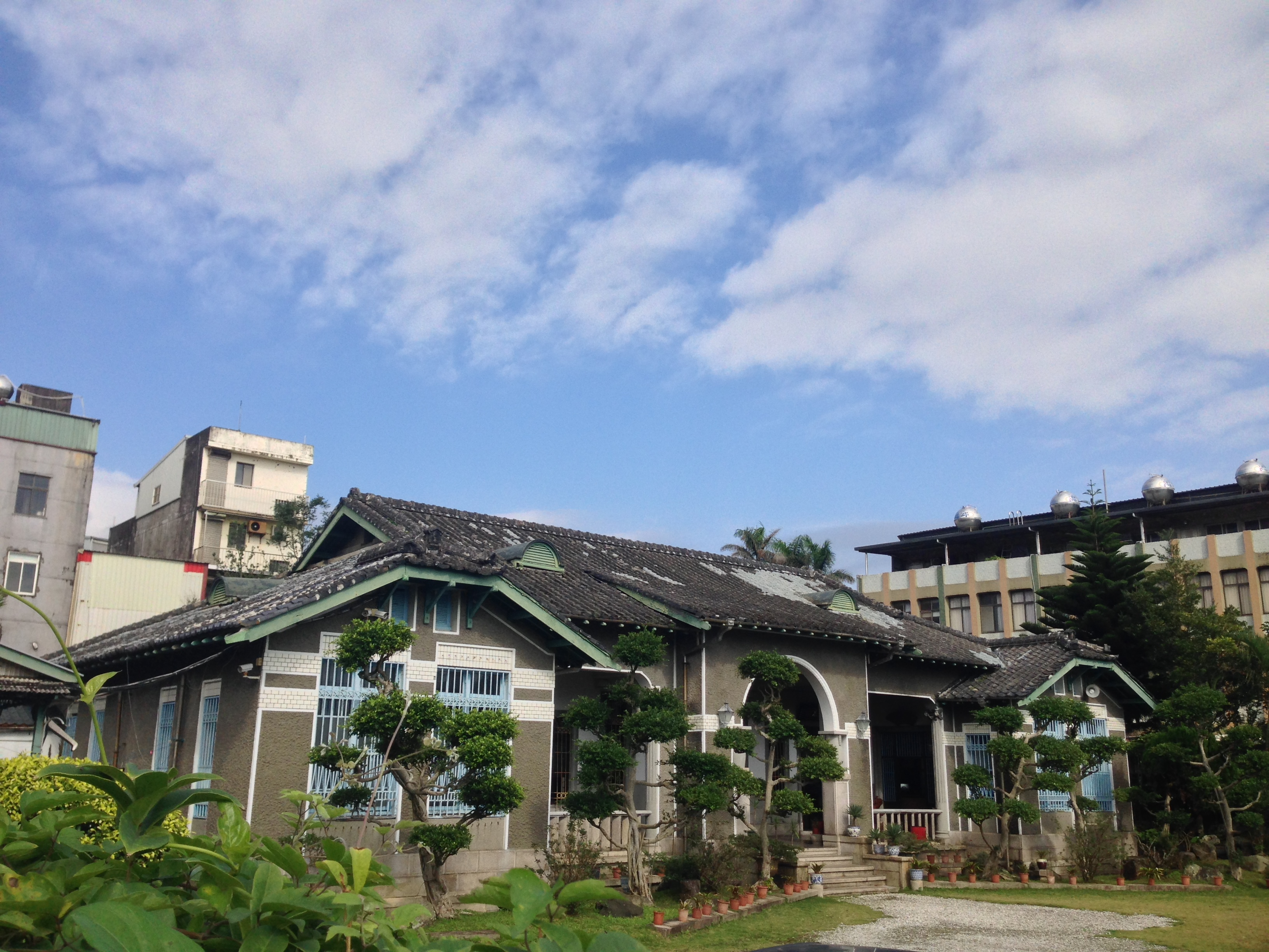 中文（台灣）: 盧纘祥故宅內景